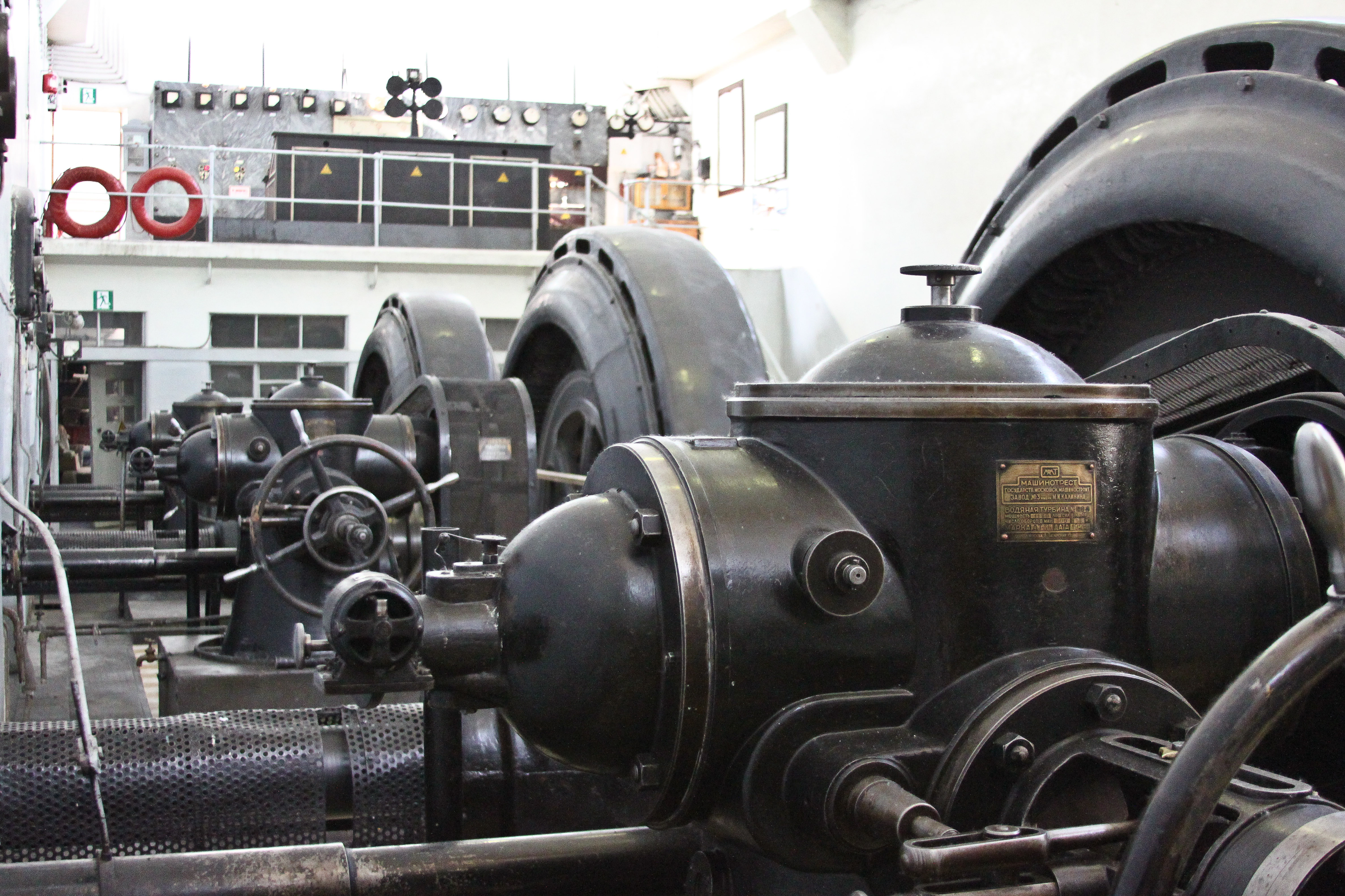 Машинный зал ГЭС (вид от генератора №3)